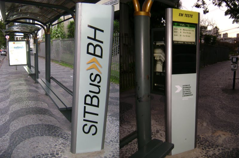 Sistema que identifica o tempo que o ônibus irá demorar para chegar ao ponto de ônibus, na Avenida Álvares Cabral, em Belo Horizonte, Minas Gerais, Brasil.